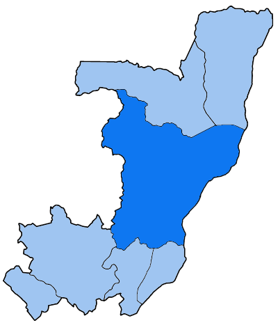 Mappa della diocesi cattolica di Owando, nella Repubblica del Congo.